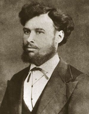 Рекеев Алексей Васильевич